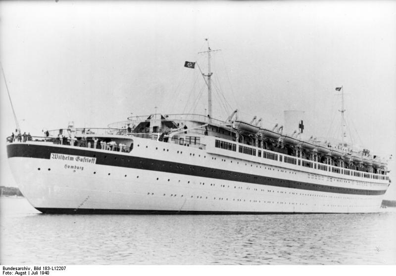 Lazarettschiff "Wilhelm Gustloff" bringt verwundete Narvik-Kämpfer nach der Heimat. "Wilhelm Gustloff" läuft in den Hafen ein. PK - Augst 5977 - 40, Juli 1940